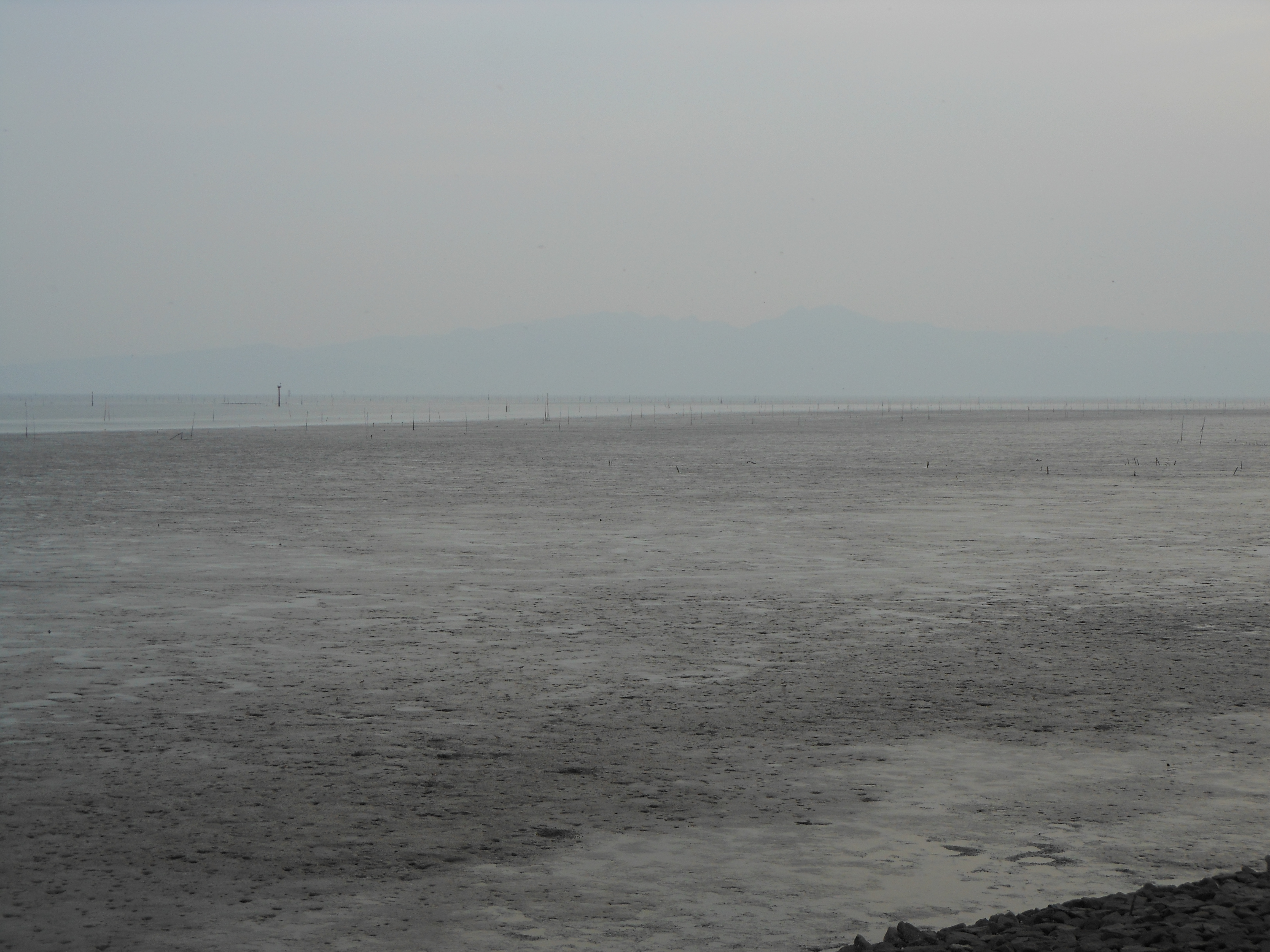 佐賀県佐賀市川副町沿岸の有明海の干潟。遠くには雲仙岳が見える。